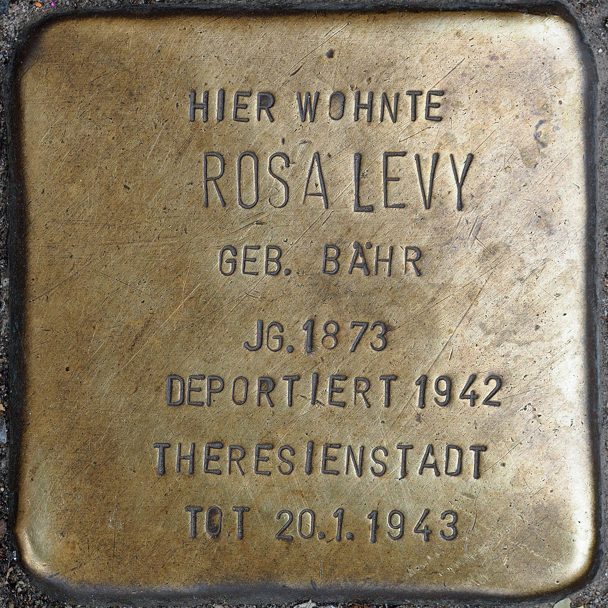 Stolpersteine MG: Levy, Rosa